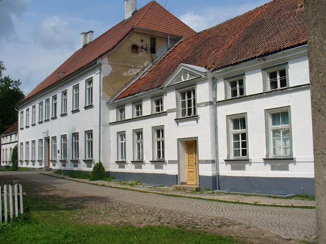 Hauptgebäude des Trakehner-Gestütes, heute Schule